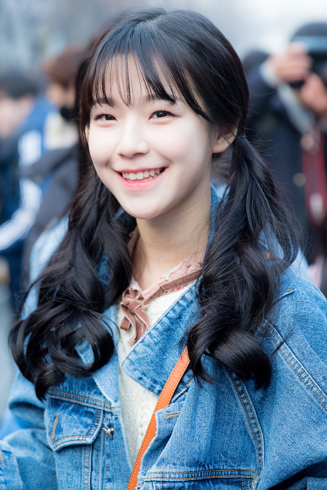 [18.02.23] 뮤직뱅크 직찍 ( 프로미스9 백지헌 )